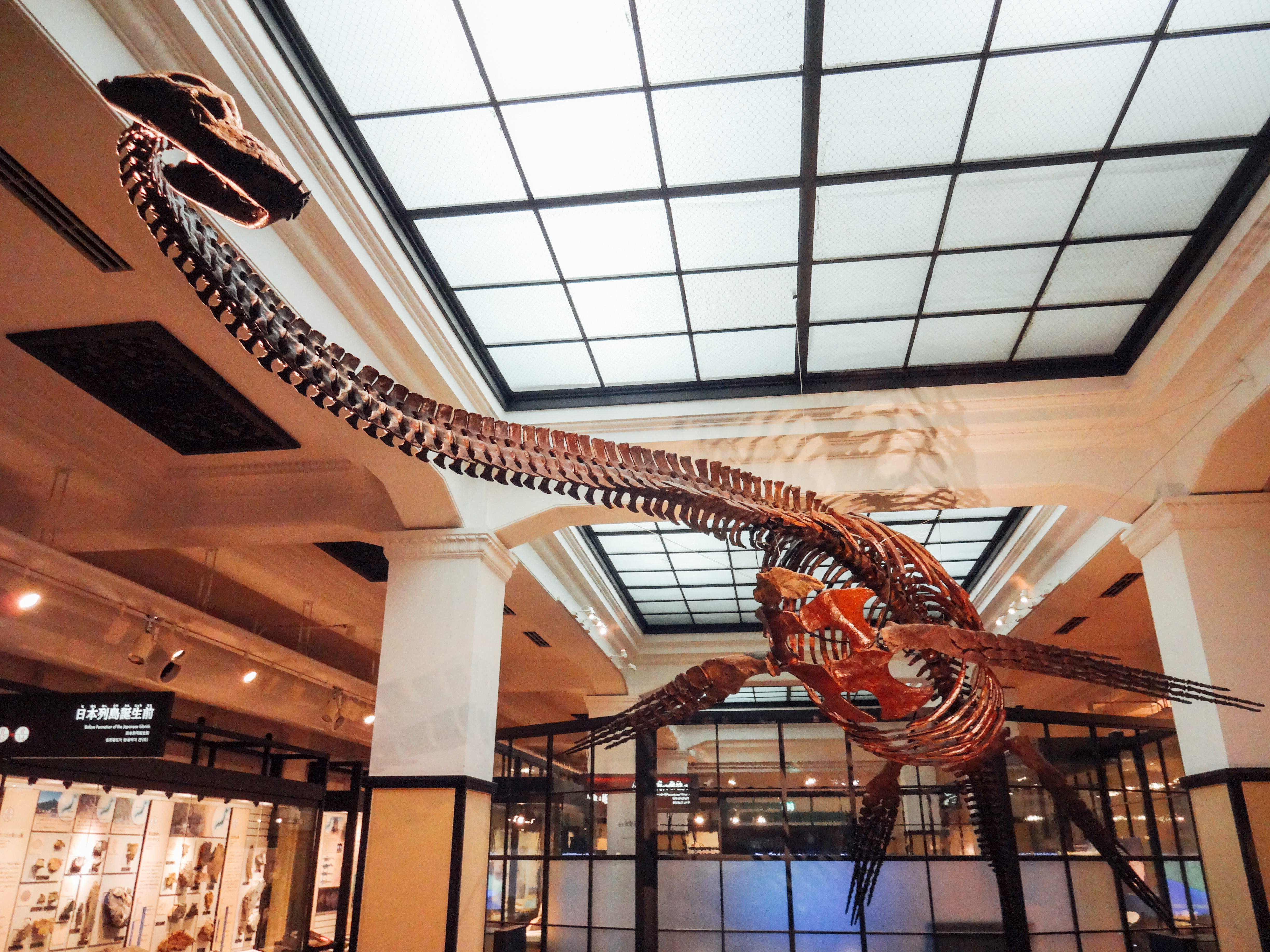 国立科学博物館 日本館 フタバスズキリュウ